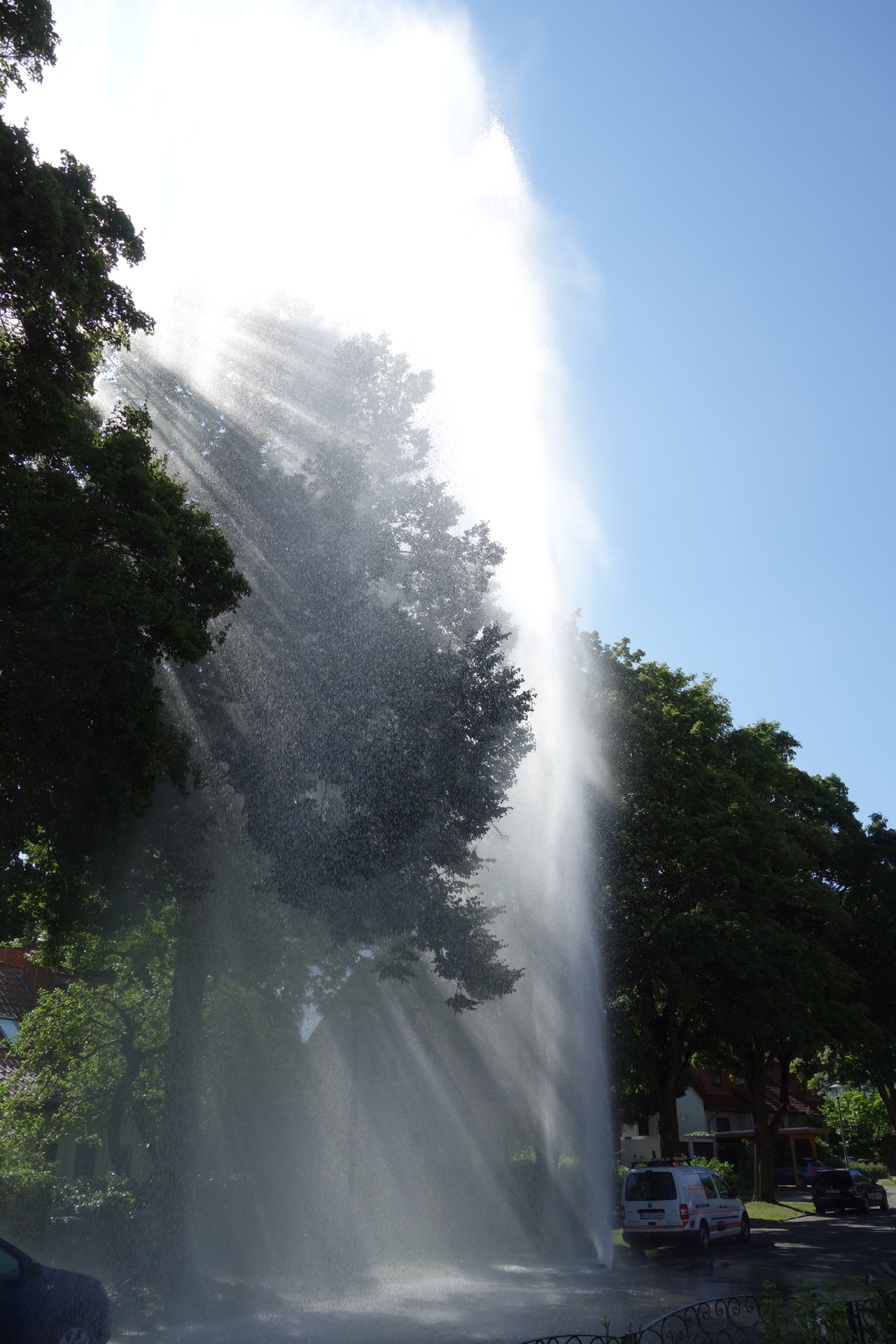 Fontäne eines defekten Unterflurhydranten in Göttingen (Juni 2017).